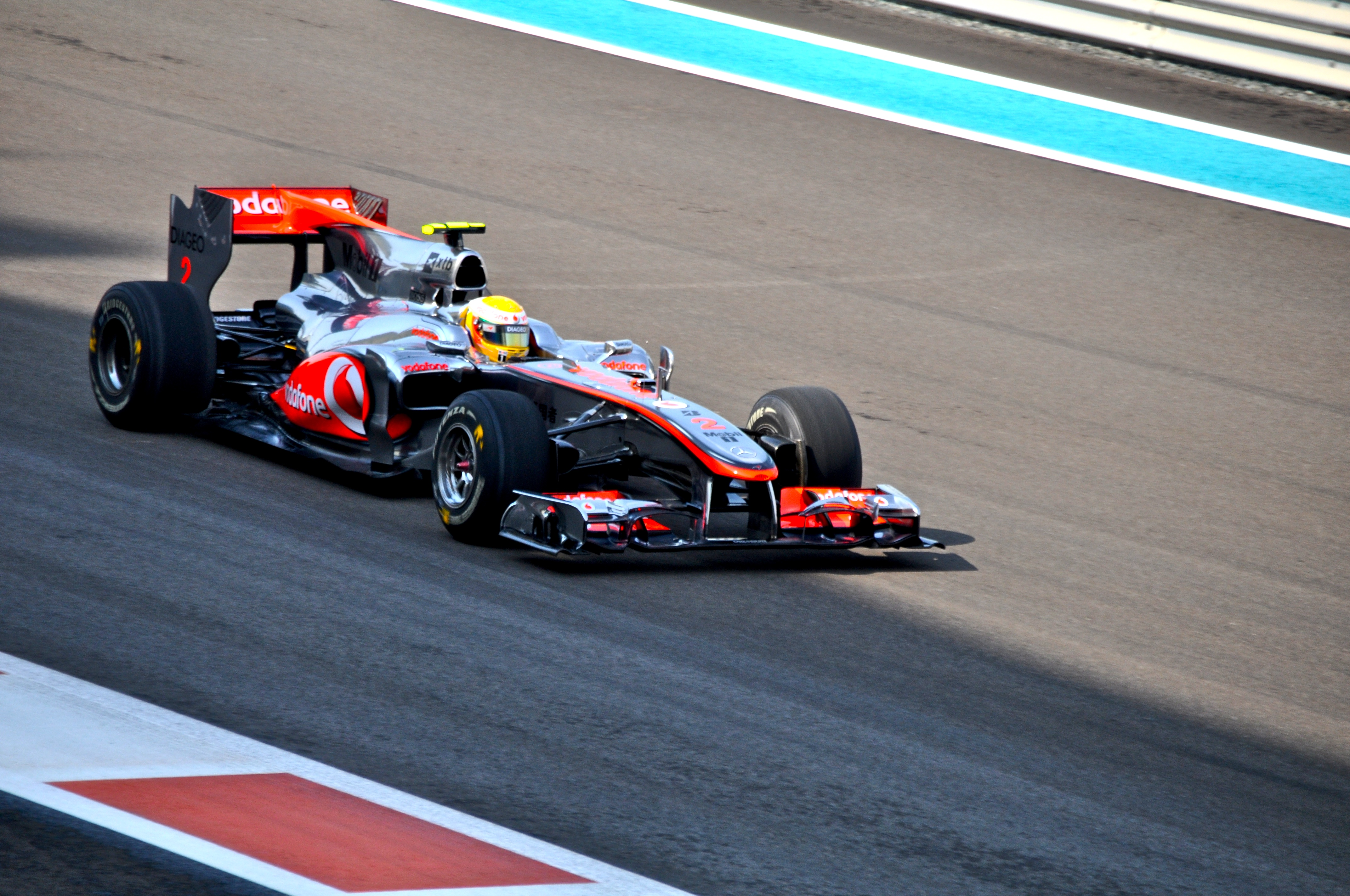 Lewis Hamilton à Abou dabi en 2010